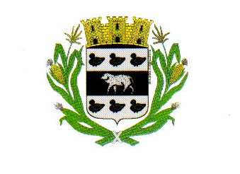 Blason Vimarcé 53